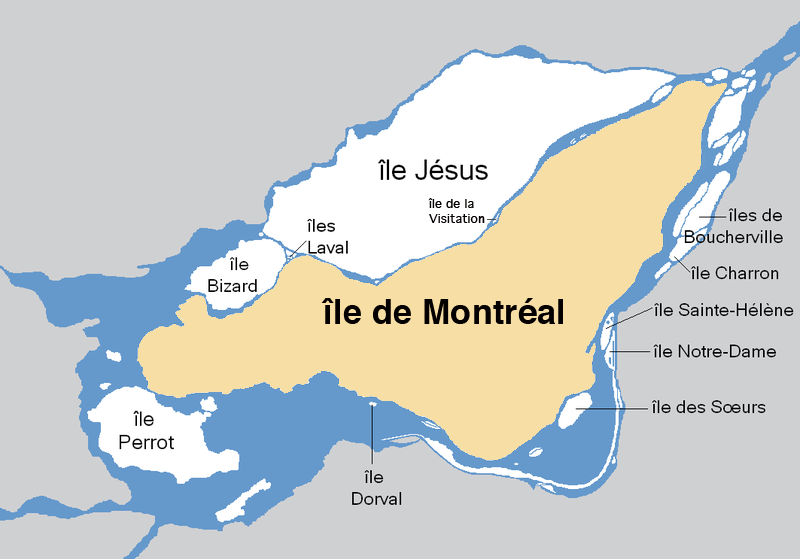 Archipel d'Hochelaga : île de Montréal, Québec, Canada